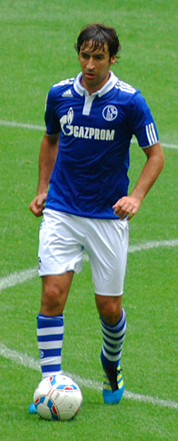 Raul Gonzalez Blanco, Spieler des FC Schalke 04